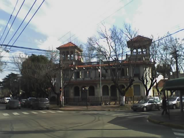 Palacio Rico, residencia construida en 1920, Merlo, Provincia de Buenos Aires.